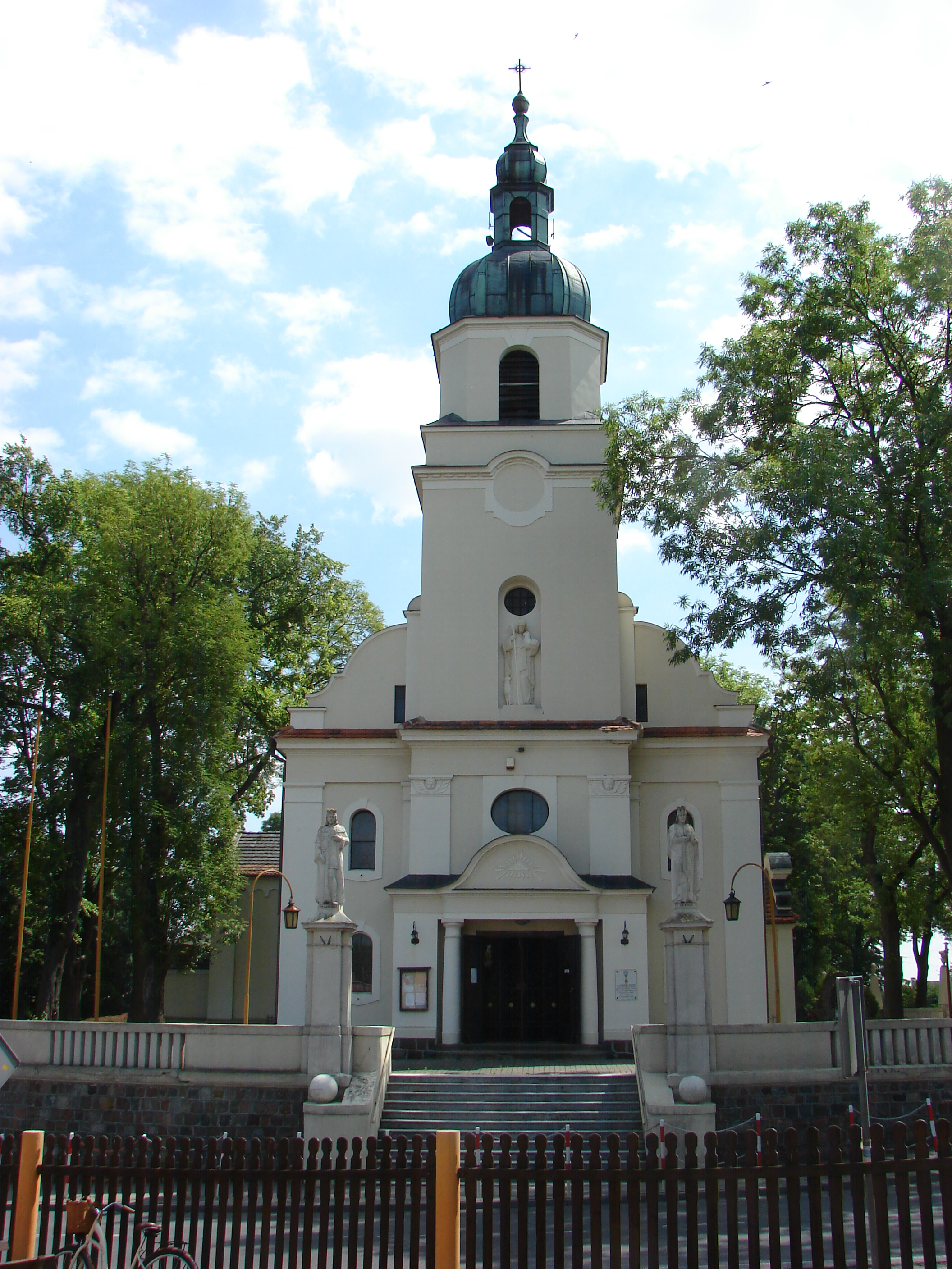 Ludzisko, Gmina Janikowo, kościół św. Mikołaja, 1865.